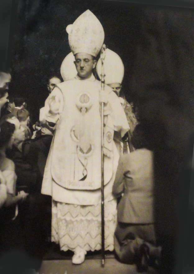 Sagração do bispo Luiz Victor Sartori